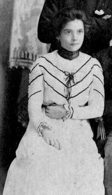 La periodista venezolana Teresa López Bustamante, nacida en Maracaibo, Estado Zulia. Integrante de la dinastía López de Venezuela, que inició el periodismo moderno en el país, y fundadora del diario "La Columna" de Maracaibo.